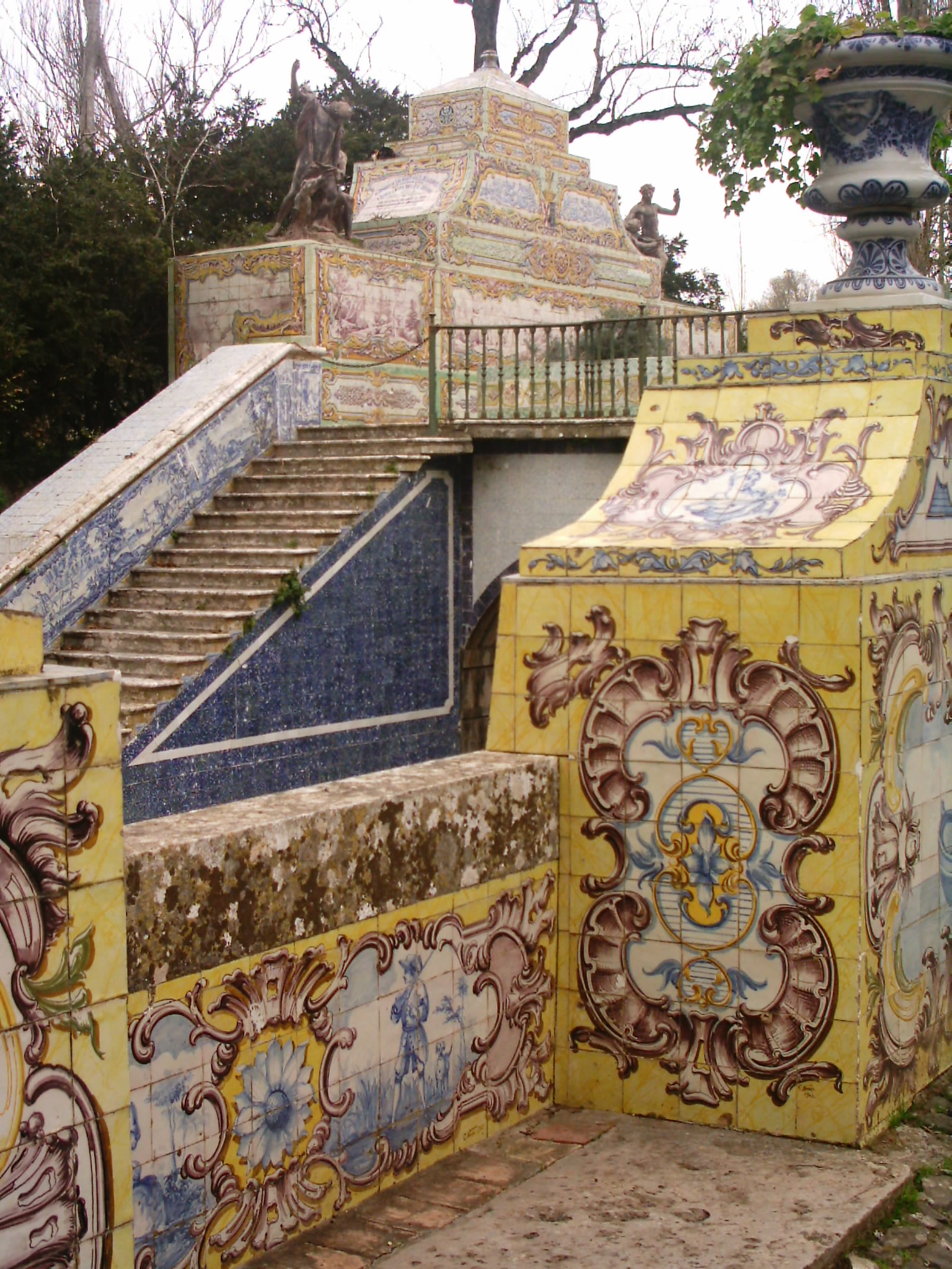 Palácio de Queluz, Portugal. Revestimentos a azulejo no Corredor das Mangas.